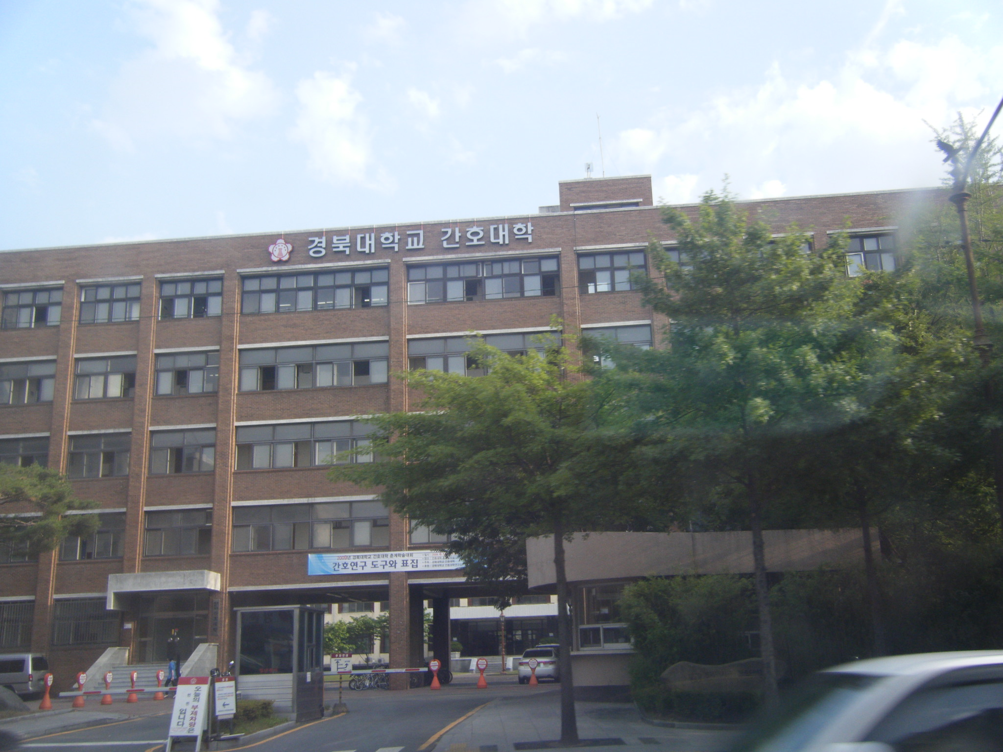 경북대학교 간호대학